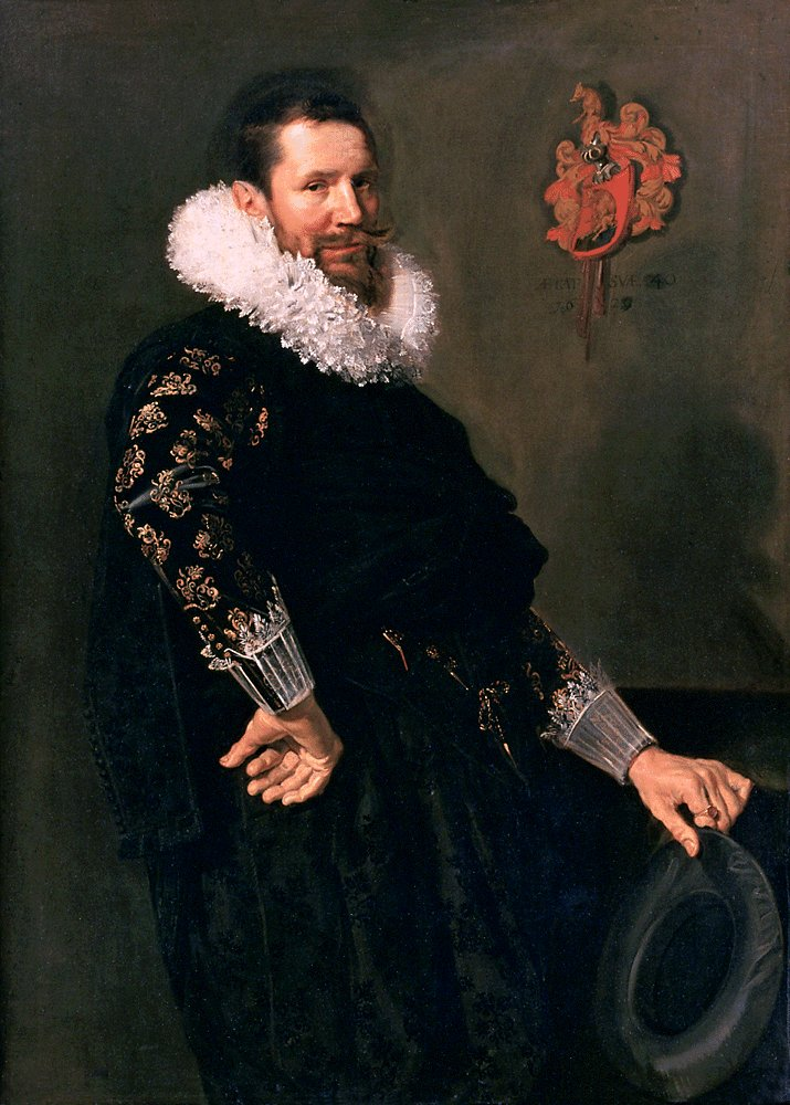 Pendant of File:Paulus van Beresteyns vrouw Catharina Both van der Eem.jpg